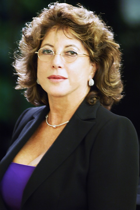 Daniela Ambrosoli